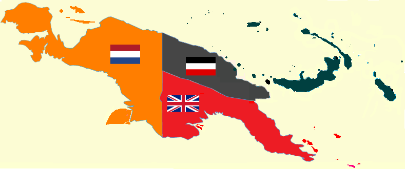 Papúa 1884-1919: En rojo Nueva Guinea Británica, en plomo oscuro Nueva Guinea Alemana y en naranja Nueva Guinea Holandesa.